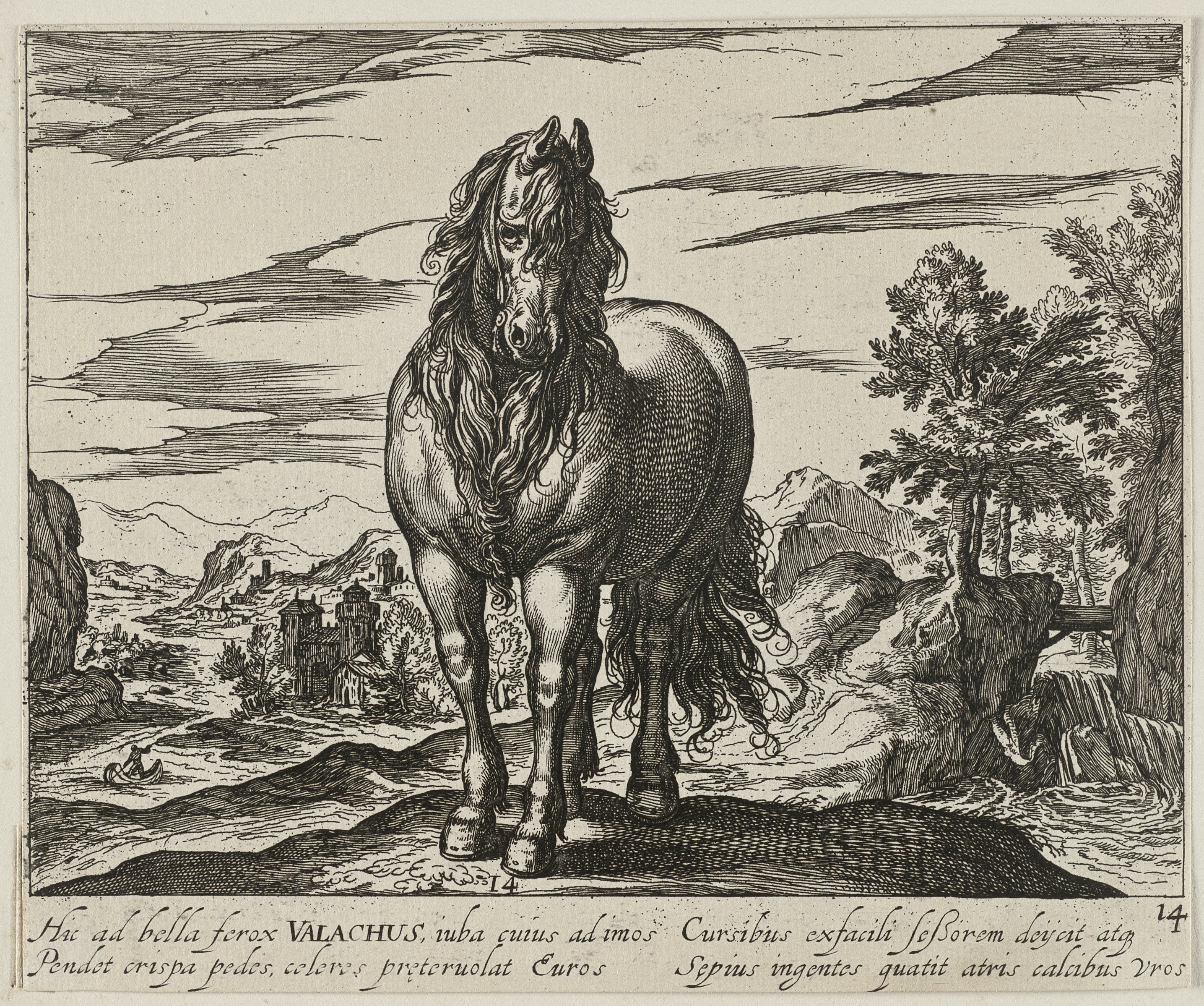 CollectieVoorhelm SchneevoogtInventarisnummerNL-HlmNHA_1477_53011506BeschrijvingLandschap met paard uit Roemenië.In de marge onder de voorstelling een tweeregelig onderschrift in het Latijn.Veertiende prent uit een genummerde, dertigdelige prentenserie met paardenrassen.Gravure en ets door Egbert van Panderen naar ontwerptekeningen van Antonio Tempesta, genummerd '14' middenonder op de voorstelling en rechtsonder in de marge.FotonummerNL-HlmNHA_1477_53011506DocumenttypeHistorieprenten, tekeningen en foto'sVervaardigerPanderen, Egbert van (1580-1637), Tempesta, Antonio (1555-1630) LandRoemenië Begindatum1590Einddatum1637TechniekGrafiek Drukwerk LiteratuurHollstein Dutch, Egbert van Panderen, 56